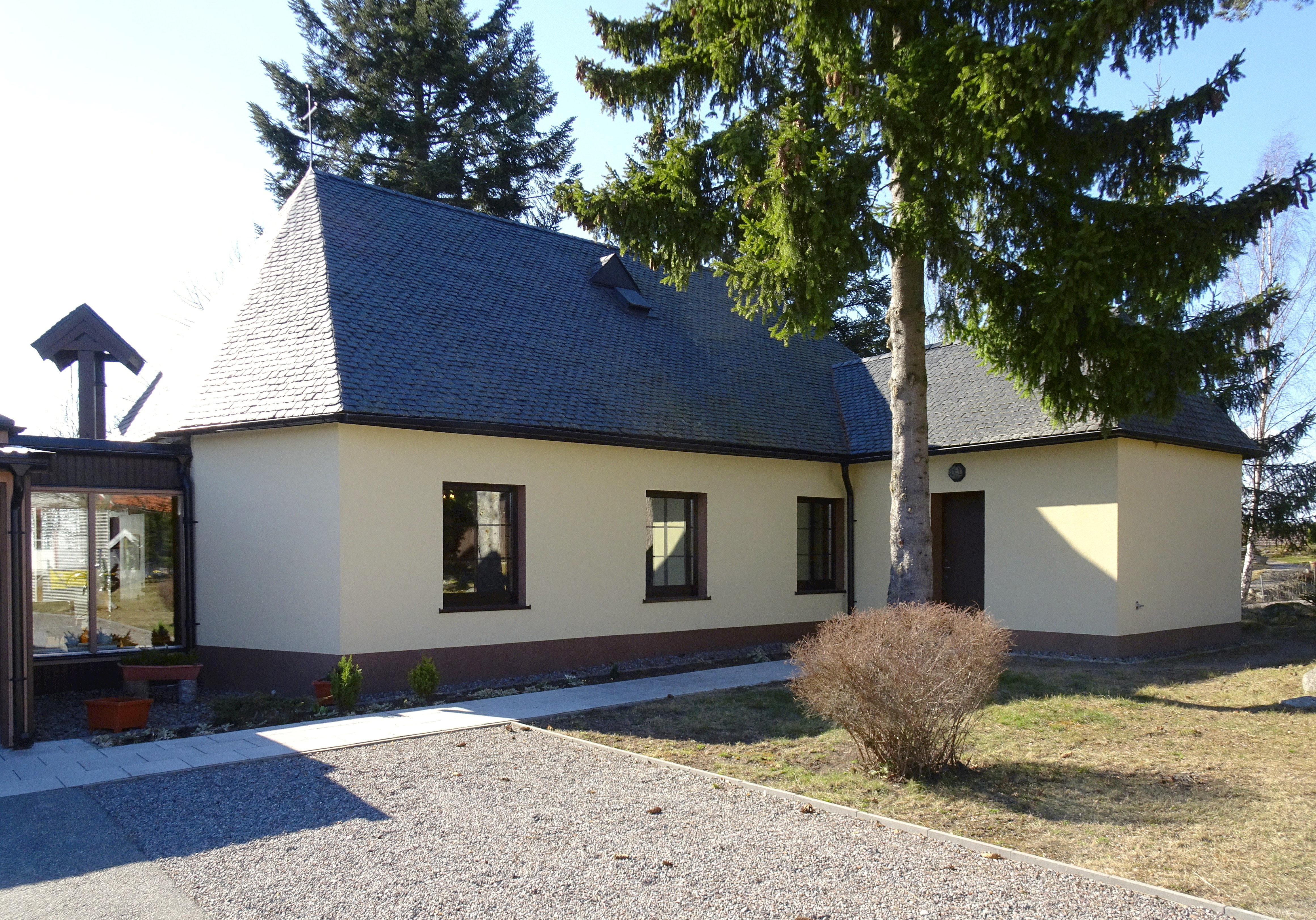 Sancta Elisabeths Systrars kapell i Stäket, arkitekt Erik Stark (1956)